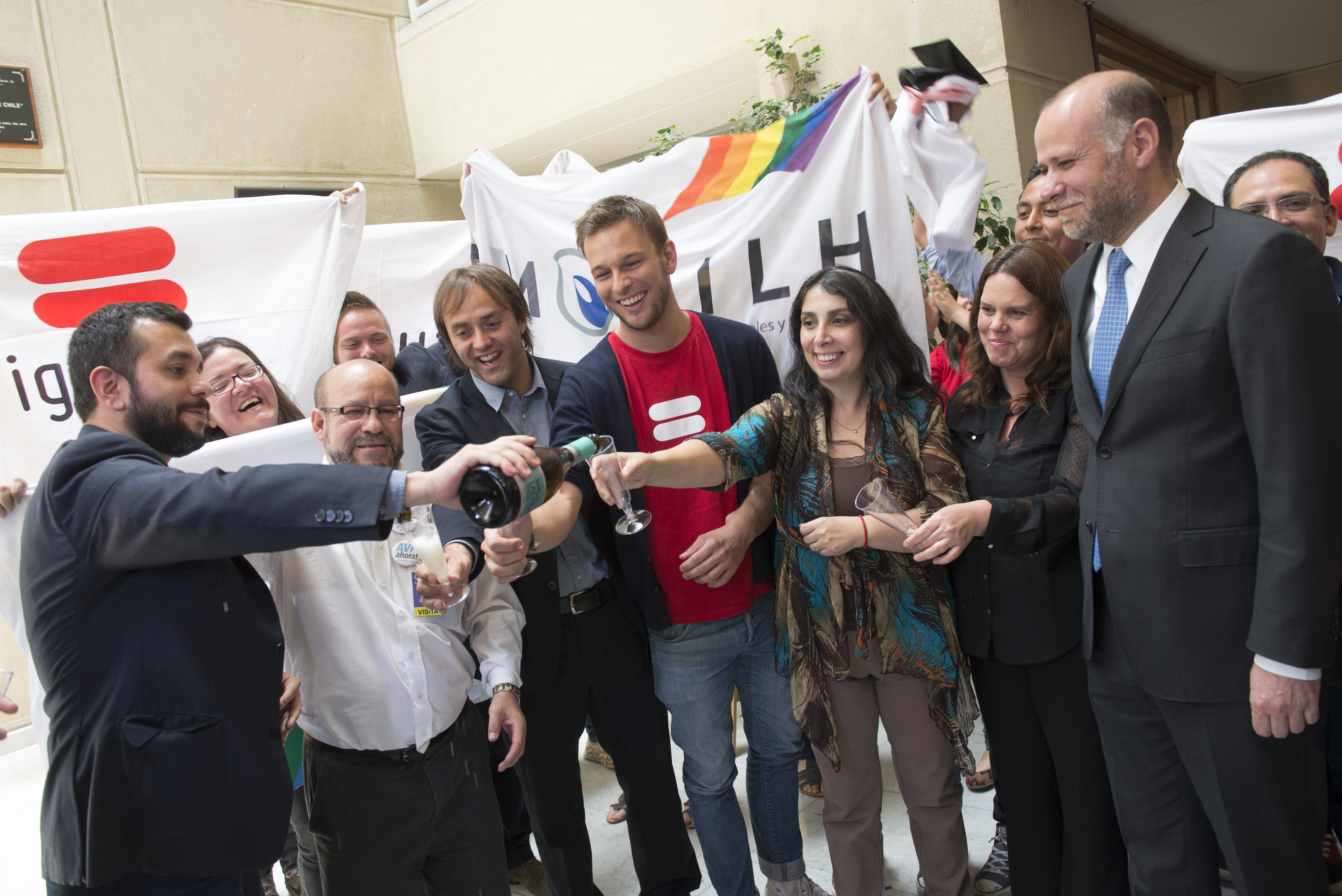 Ministro Álvaro Elizalde Participa de Sesiones de Senado y Camara en Aprobación de la Unión Civil y Creación del Ministerio de la Mujer